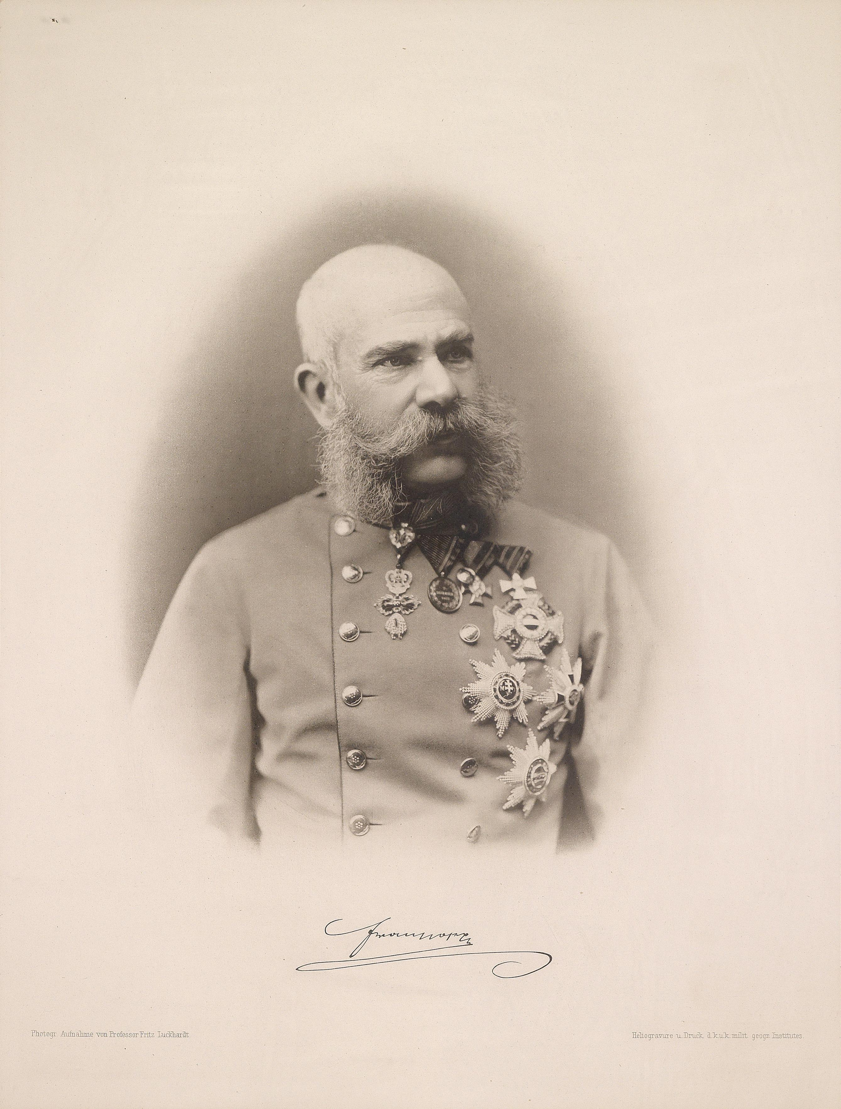 Kaiser Franz Joseph I. Heliogravure, 41 x 31 cm